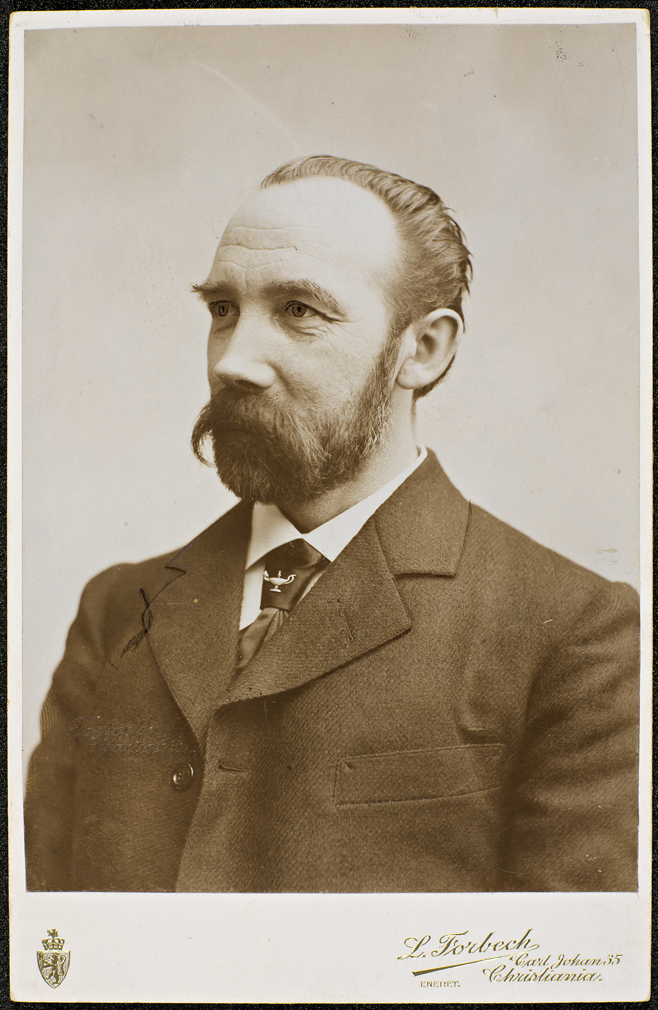 Tittel / Title: Portrett av Moltke Moe Beskrivelse / Description: Kabinettkort / cabinet card. Moe var sønn av Jørgen Moe (1813-1882), og folklorist. Da faren og P. C. Asbjørnsen døde, overtok han utgivelsen av eventyrene, og utga flere reviderte og fornorskede utgaver. Dato / Date: ukjent / unknown Fotograf / Photographer: L. Forbech (Christiania) Sted / Place: Oslo Eier / Owner Institution: Nasjonalbiblioteket / National Library of Norway Lenke / Link: Bildesignatur / Image Number: blds_01343